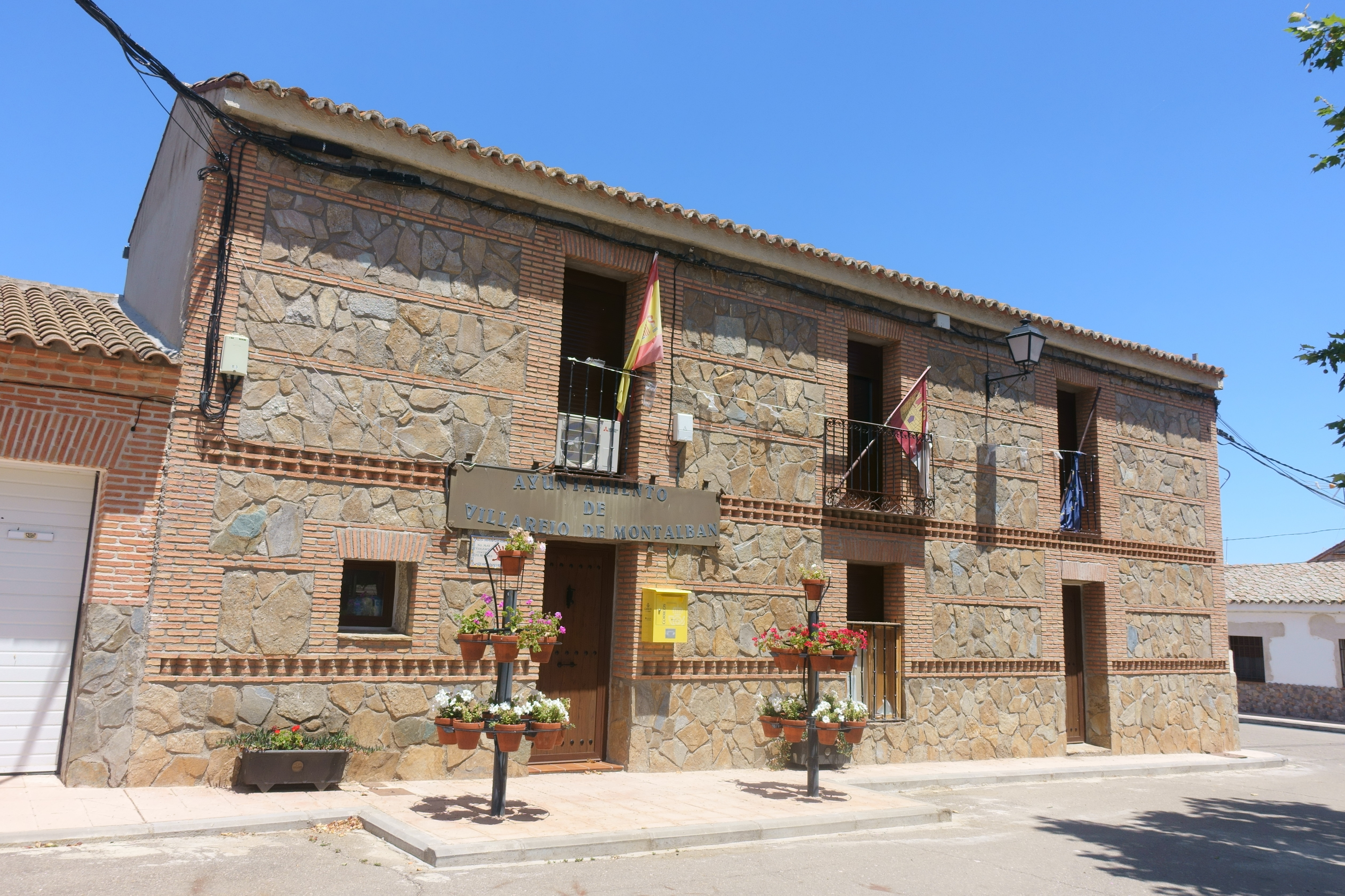 Casa consistorial de Villarejo de Montalbán (Toledo, España).